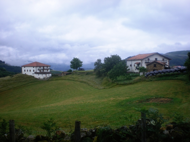 Arizkungo Pertalats auzoa.